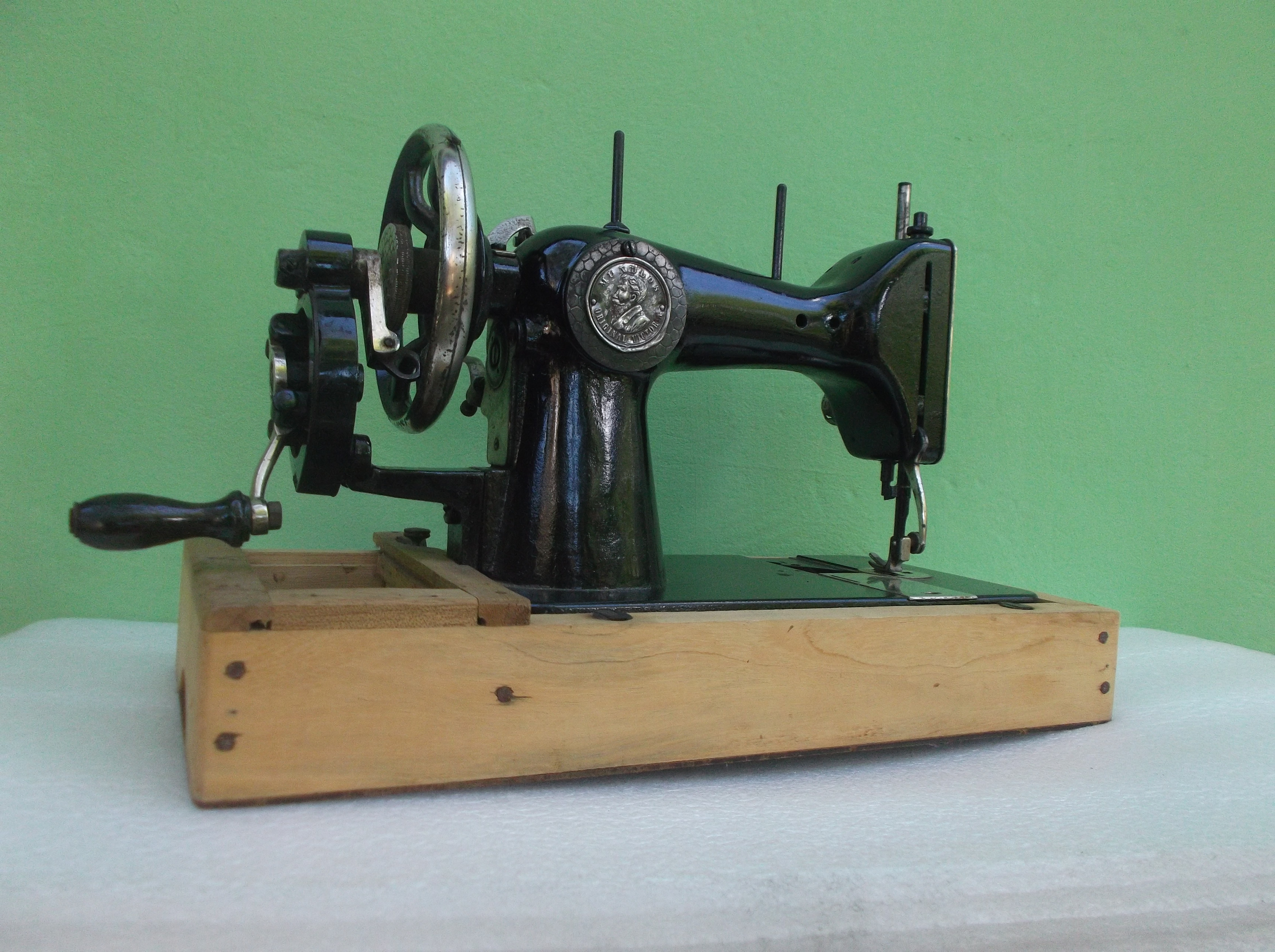 Antiga máquina de costura à manivela do fabricante Heinrich Mundlos.